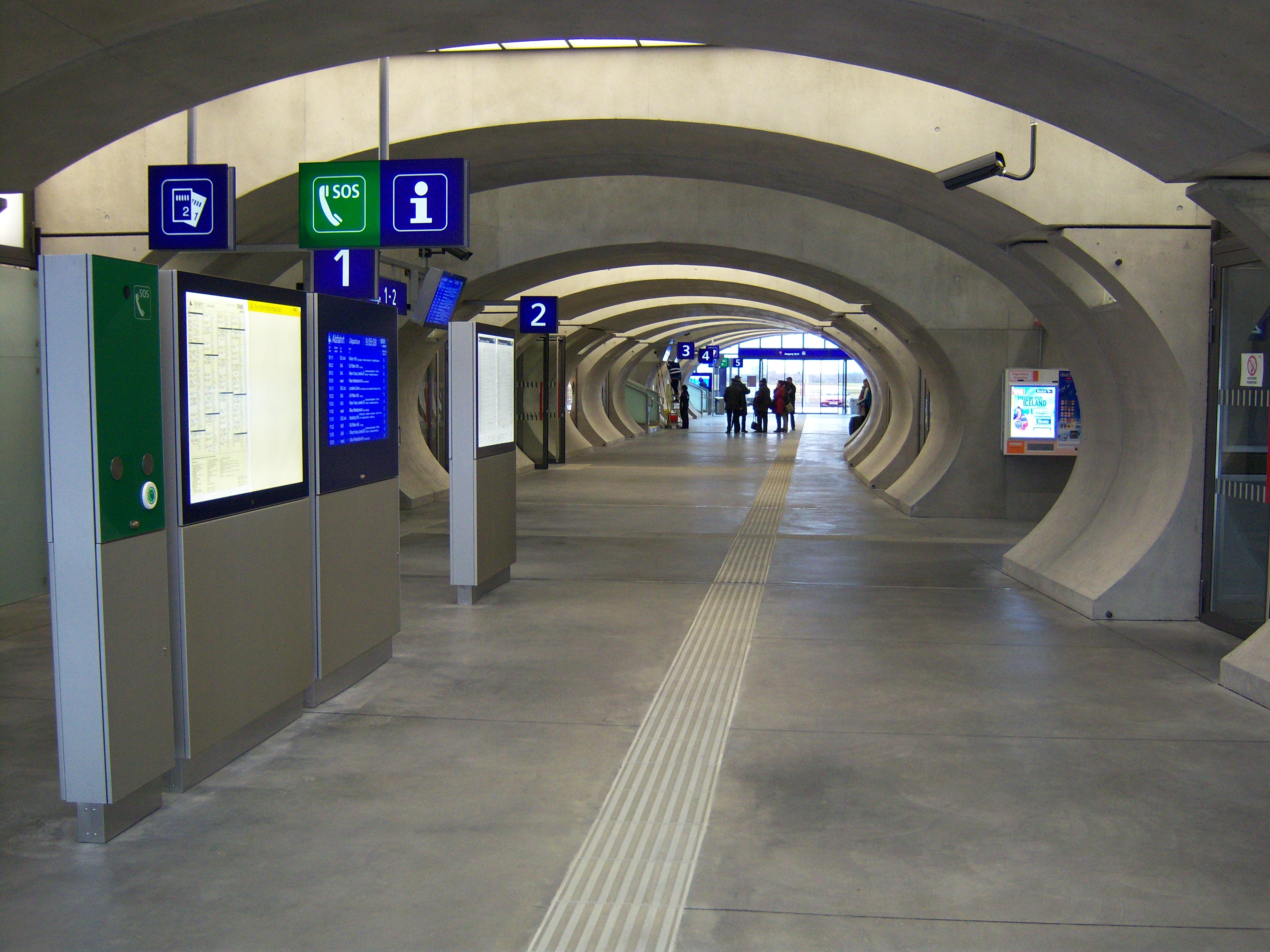 Bahnhof Tullnerfeld, Verteilerpassage, Blickrichtung Norden